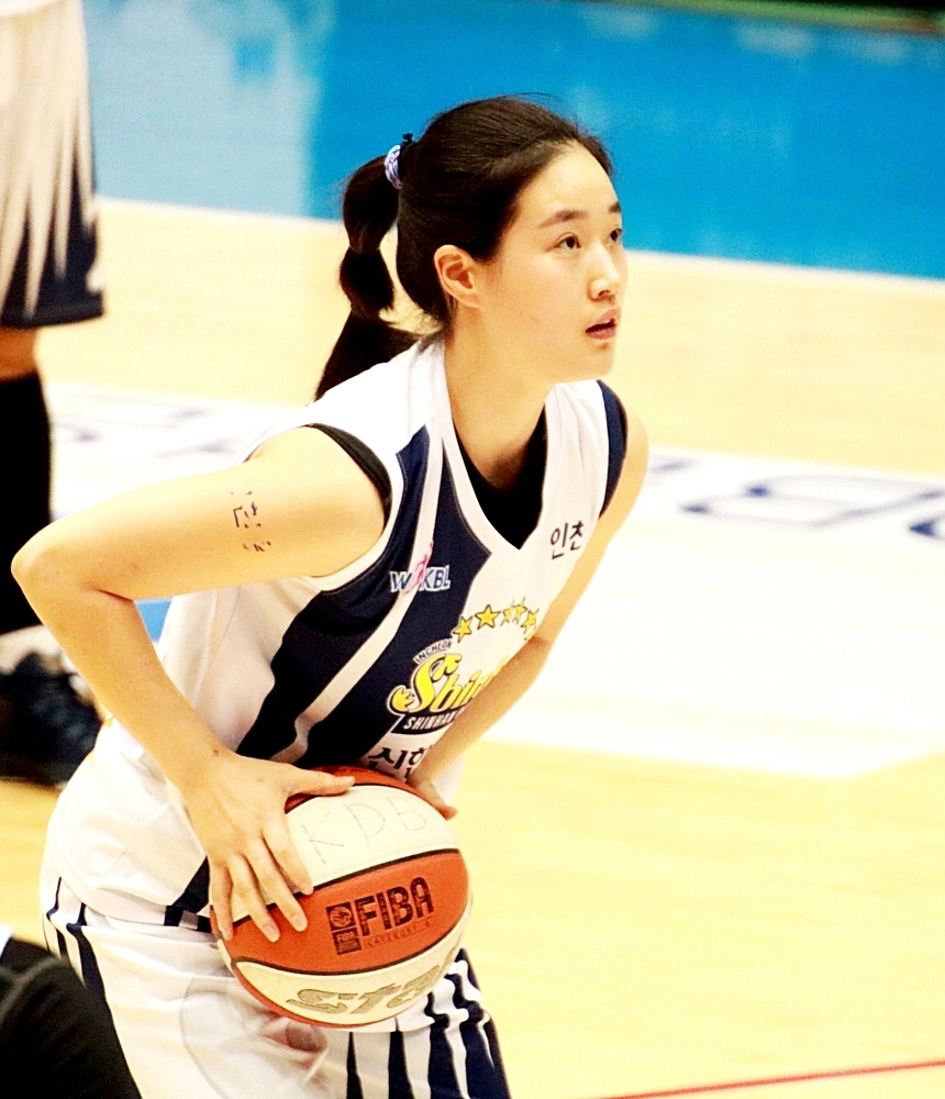 160205 여자농구 KDB생명 vs 신한은행 퓨처스